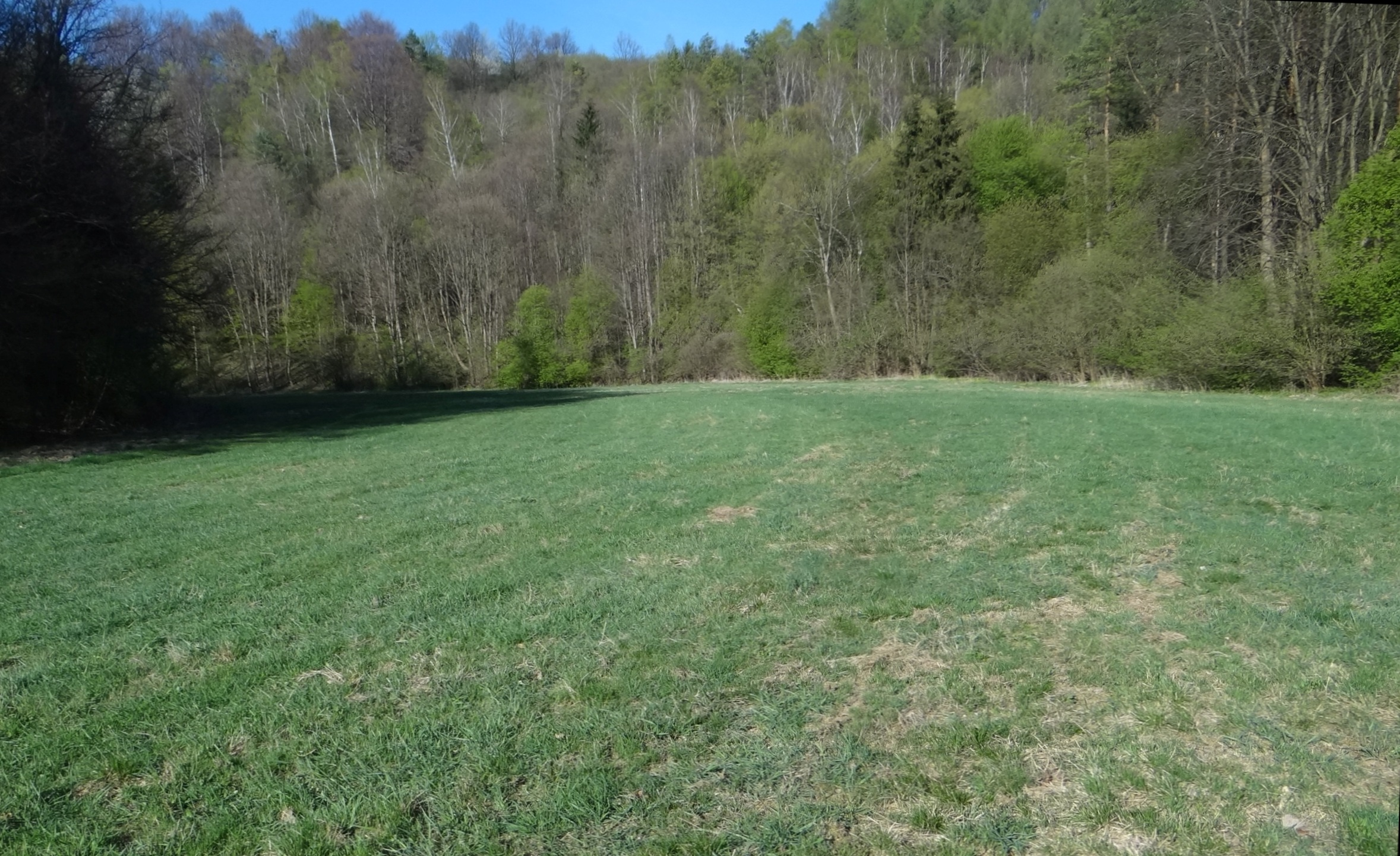 Dolina Zachwytu w Ojcowskim Parku Narodowym